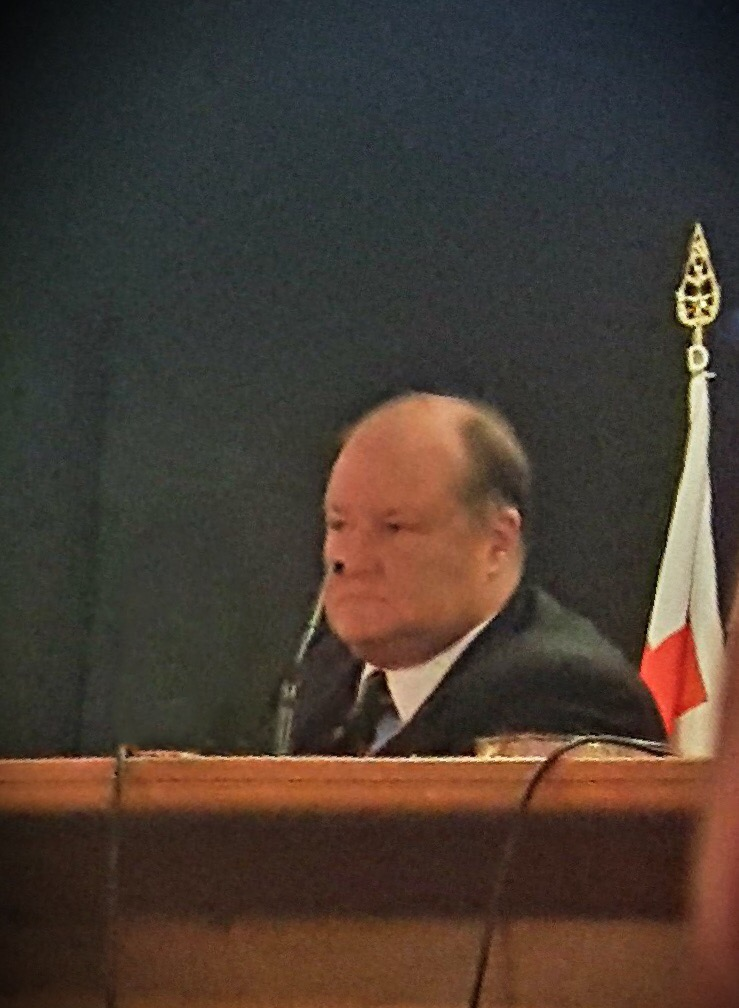 Massimo Barra, 2016